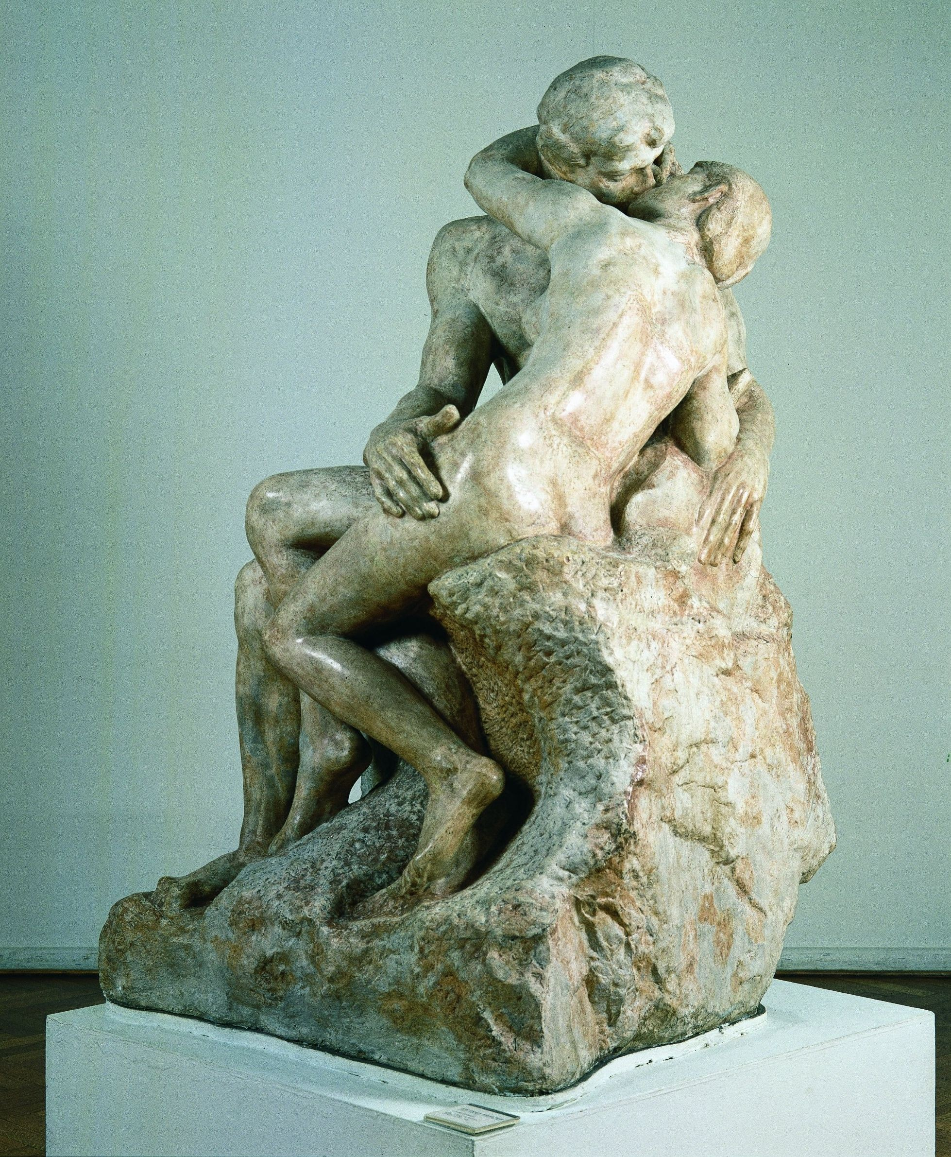 Auguste Rodin, Le baiser (El beso). Siglo XIX. 182 x 113 x 112 cm, modelado y vaciado yeso. Inv. 3659.